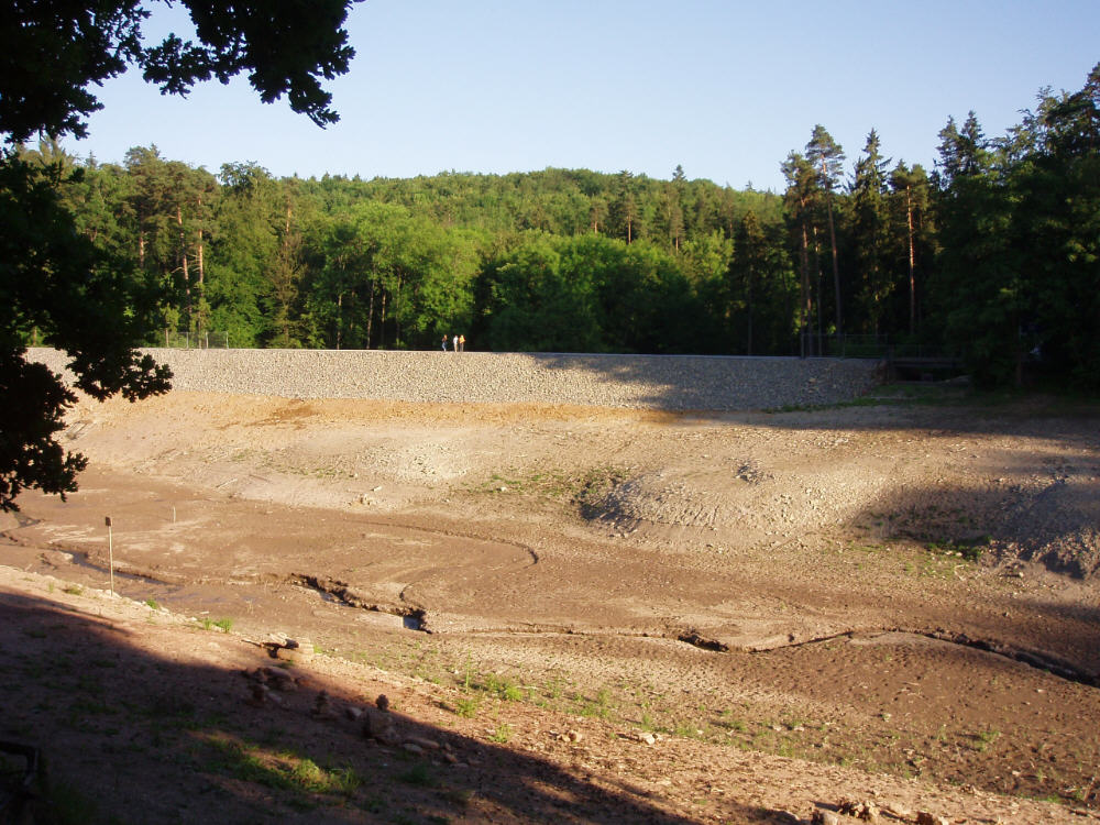 der abgelassene Neue See in Stuttgart